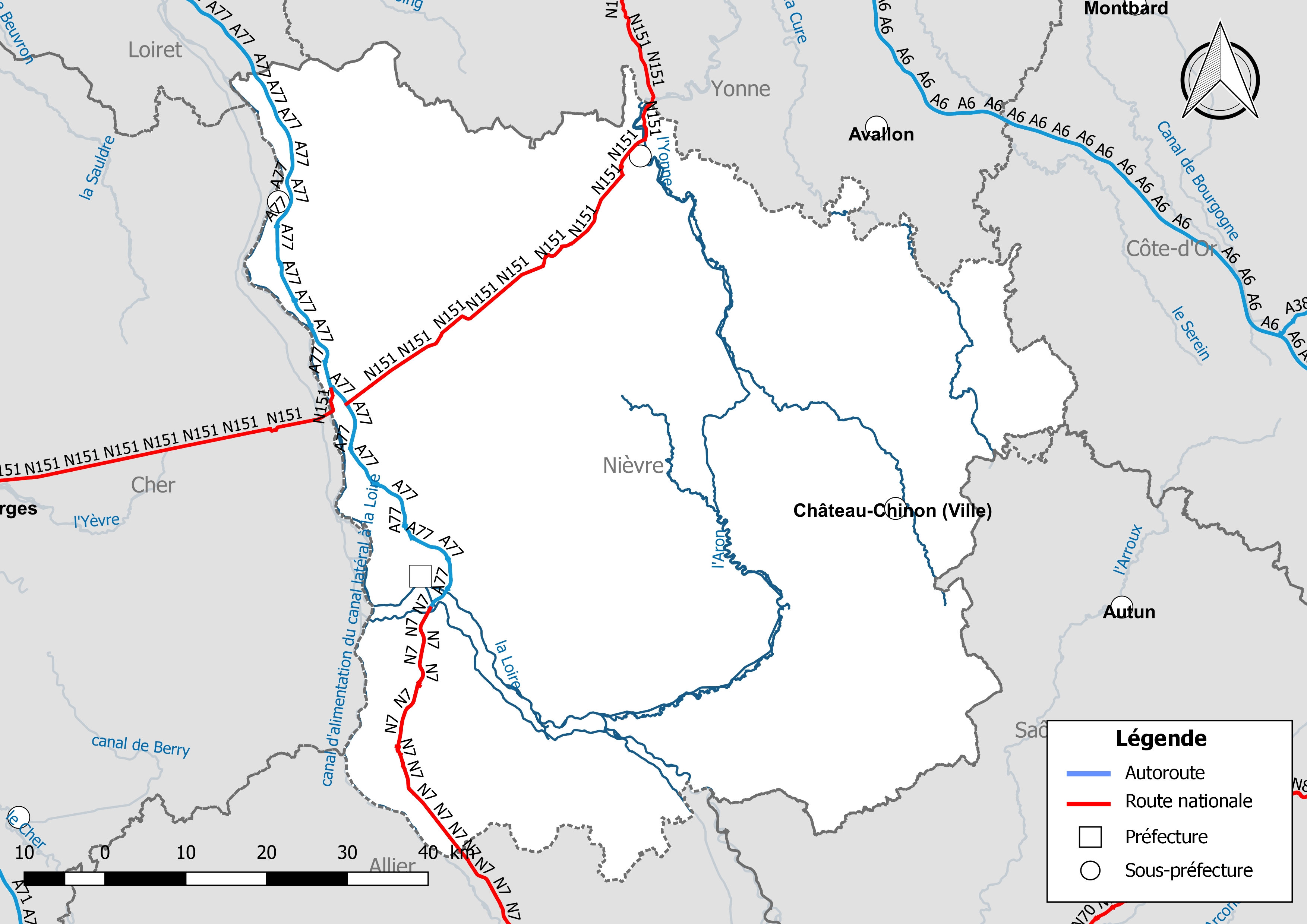 Carte du réseau routier national, constitué des autoroutes et des routes nationales, dans le département de la Nièvre (France). Situation au 1er janvier 2019.